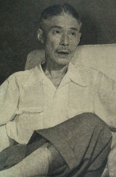 原田三夫（科学評論家）